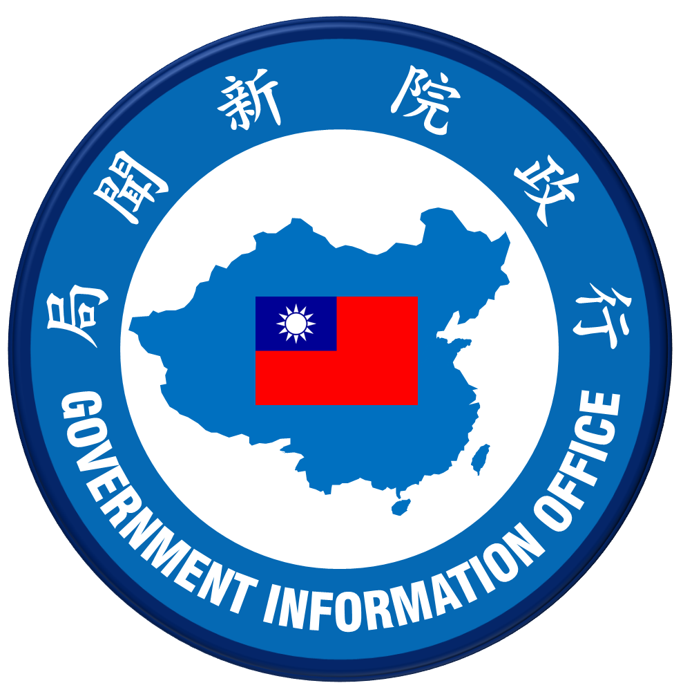 行政院新聞局局徽，2001年12月前版本。XRAY96依據人民網照片重繪。